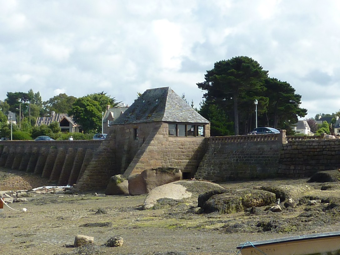 Moulin à marée de Trégastel sur le port de Ploumanac'h